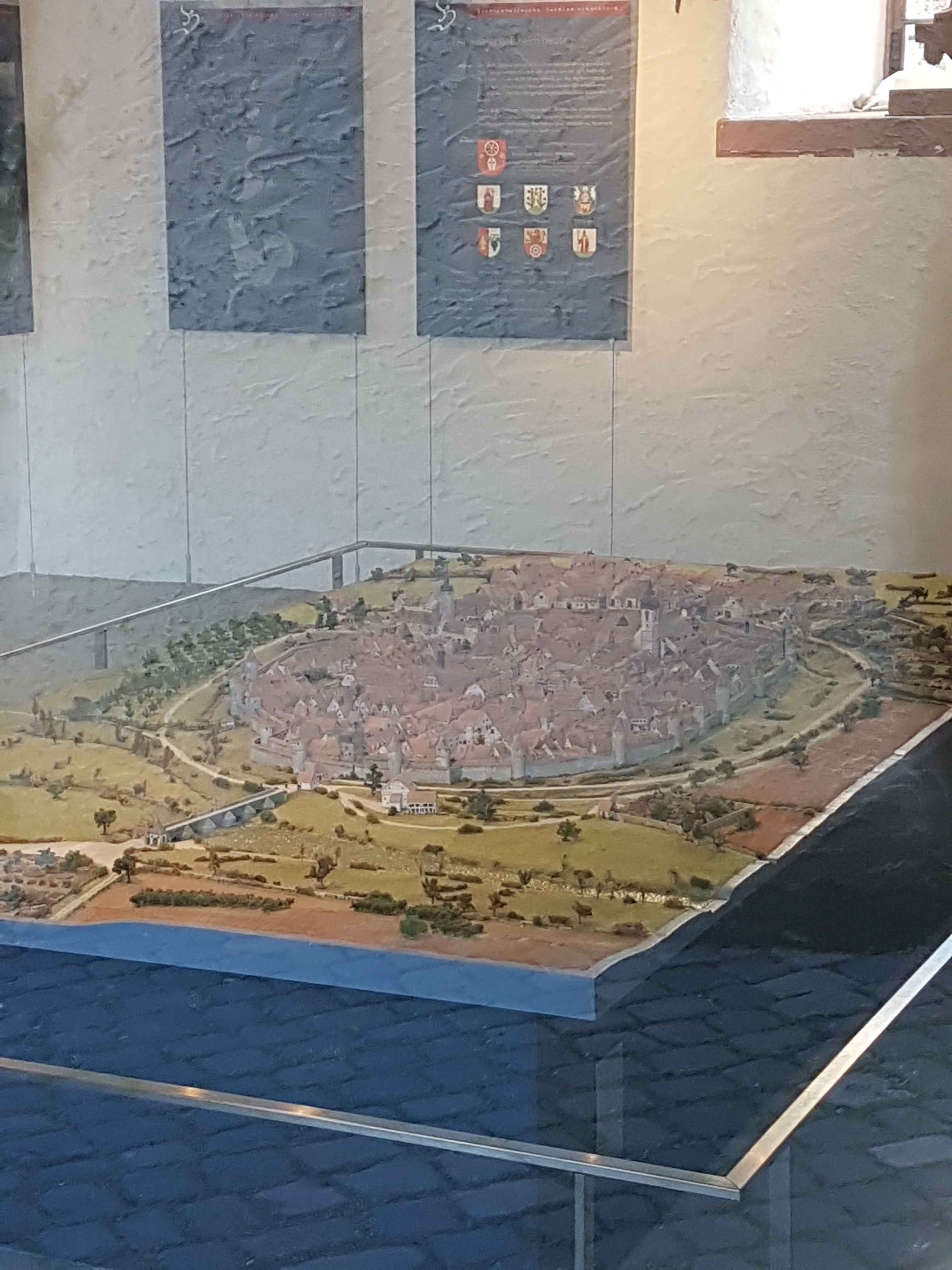 Kurmainzisches Schloss Tauberbischofsheim mit Türmersturm und Tauberfränkischem Landschaftsmuseum Historisches Stadtmodell im Tauberfränkischen Landschaftsmuseum, durch eine Glasscheibe auch von außen sichtbar - seit 2003 beherbergt das Museum ein Modell von „Bischofsheim“ um die Mitte des 18. Jahrhunderts - in äußerster Detailgenauigkeit von einer heimatverbundenen Arbeitsgruppe geschaffen - koloriertes Stadtmodell, vorwiegend aus Buchen- und Kirschenholz - zeigt im Maßstab 1:250 die Zwei-Tore-Stadt und ihre Besonderheiten, beispielsweise eine damals etwa 10 Meter hohe Ringmauer mit ihren etwa 20 Wachtürmen und Tortürmen mit Zwingern, das Schloss, in Fachwerkbauweise errichtete Häuser, Mühlen, Badehäuser, im Zentrum den großen rechteckigen Marktplatz - Stadtmodell gibt eine Vorstellung davon, wie Tauberbischofsheim um 1750 aussah, ehe die Befestigung nach und nach abgebrochen wurde - Ausstellungsraum enthält neben dem Stadtmodell eine Dokumentation zur Entstehung und Entwicklungsgeschichte von Tauberbischofsheim